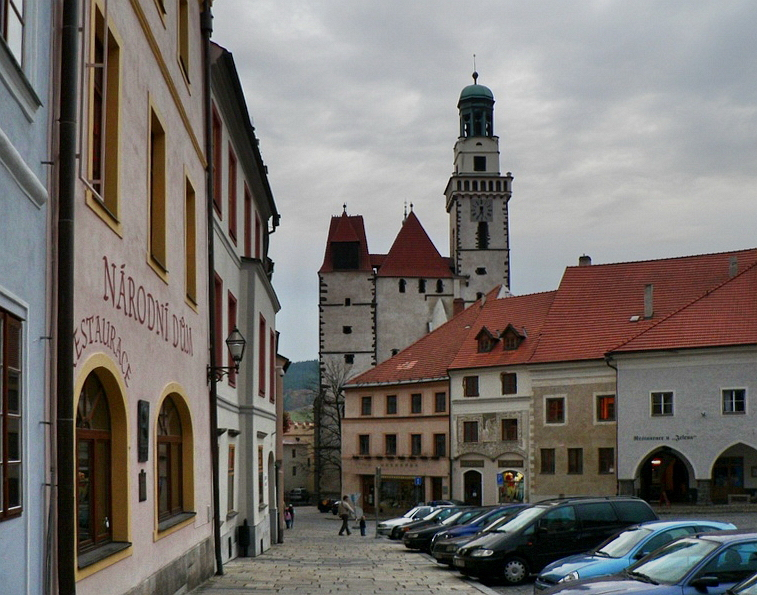 Náměstí s kostelem sv. Jakuba.